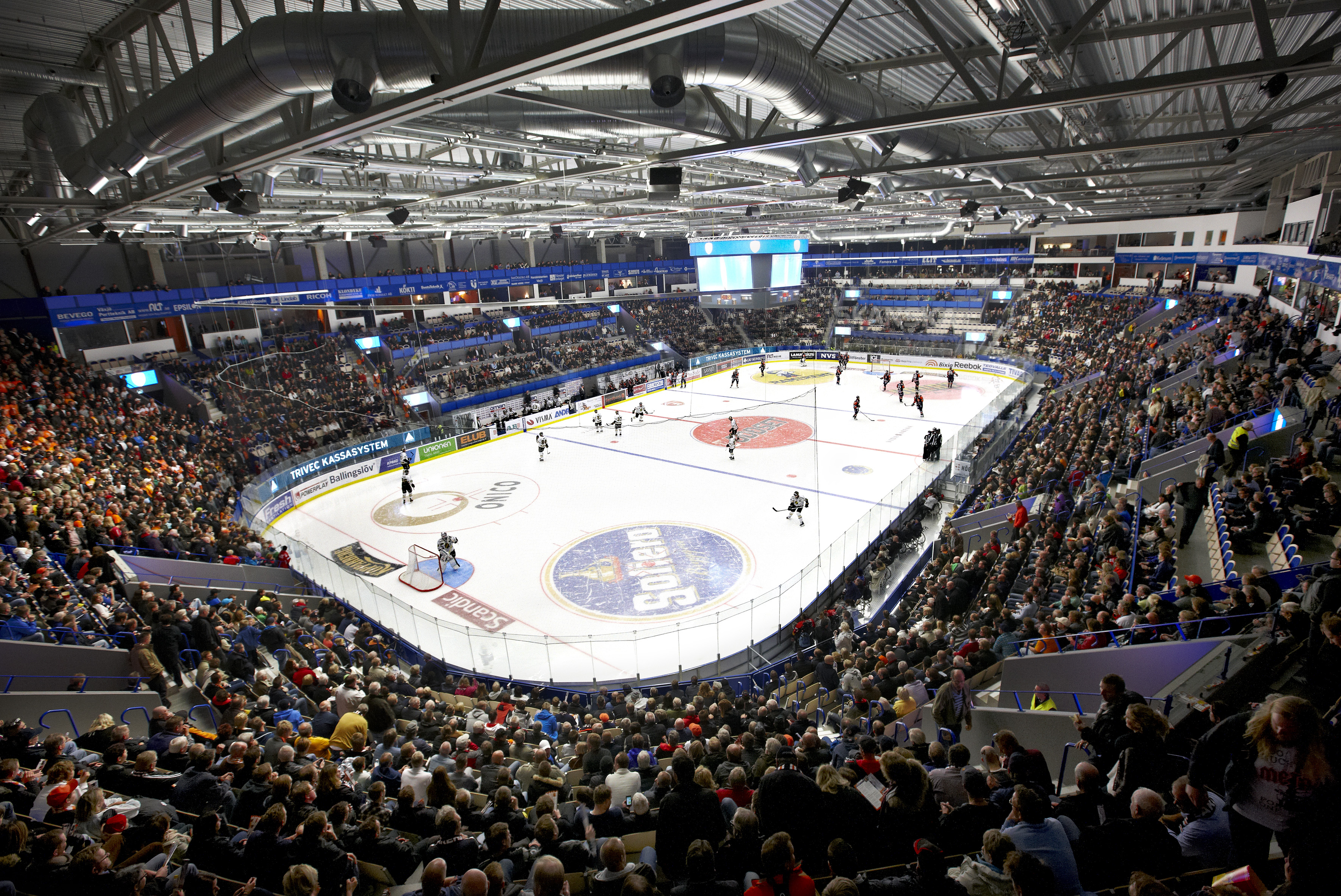 Lakers i Vida Arena